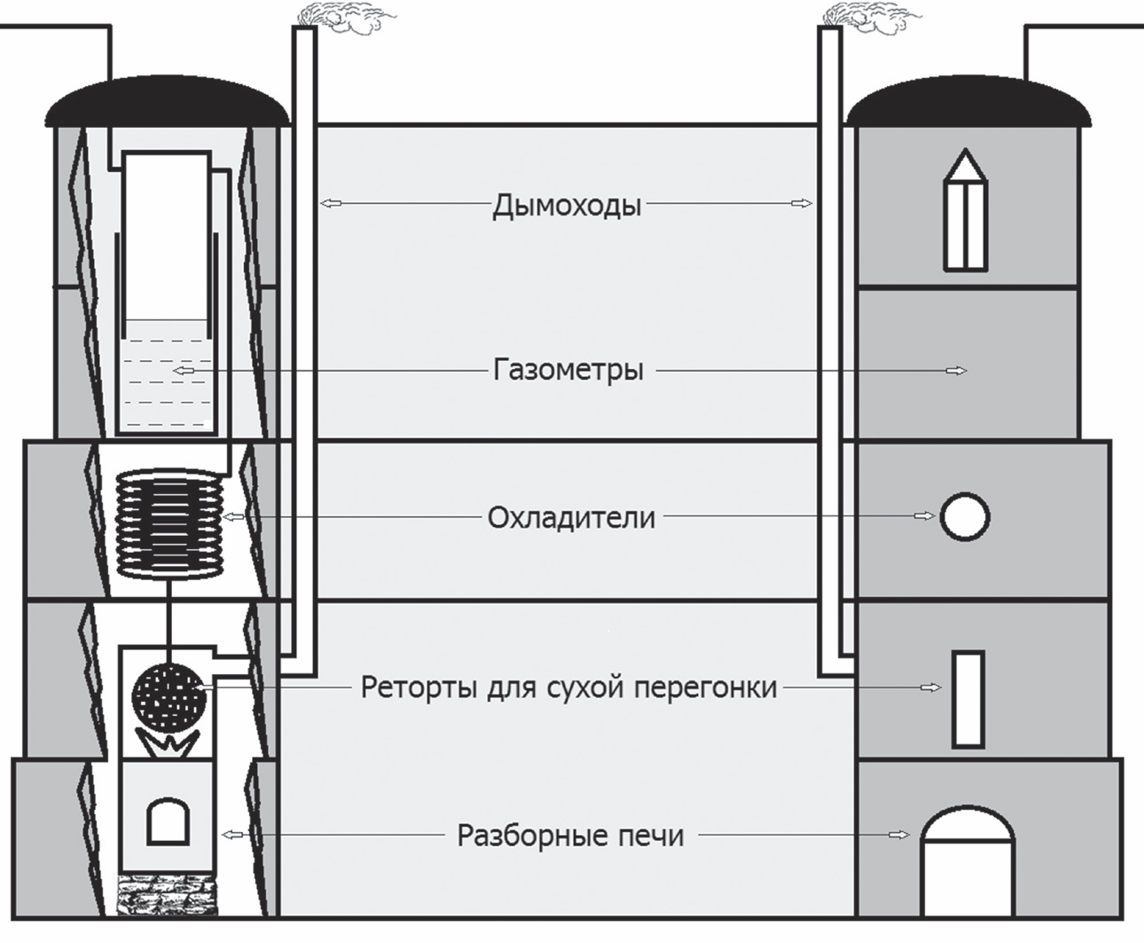 Свободная замена иллюстрации — Схема газогенераторной станции Всеволожских